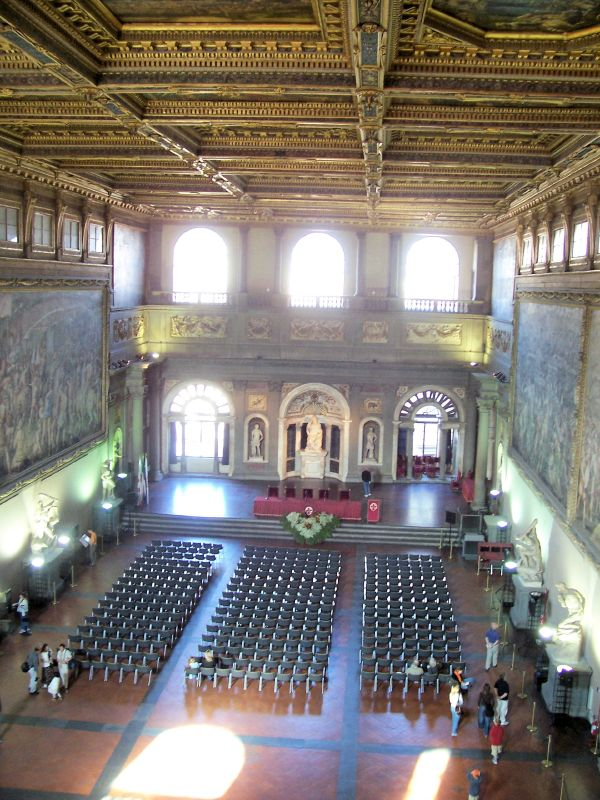 Piazza Della Signoria, Firenze, Italia